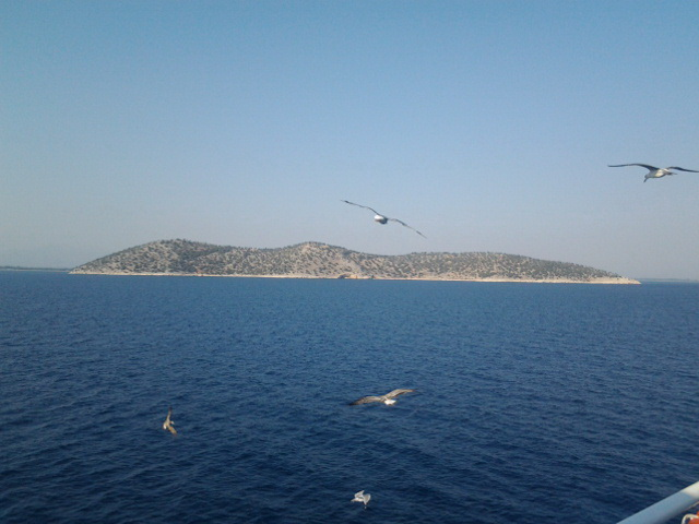 Dragan Cvetković Niš Sopstvena slika Grčka 2013 Ostrvo Tasopulo Tasos Grčka Licensing